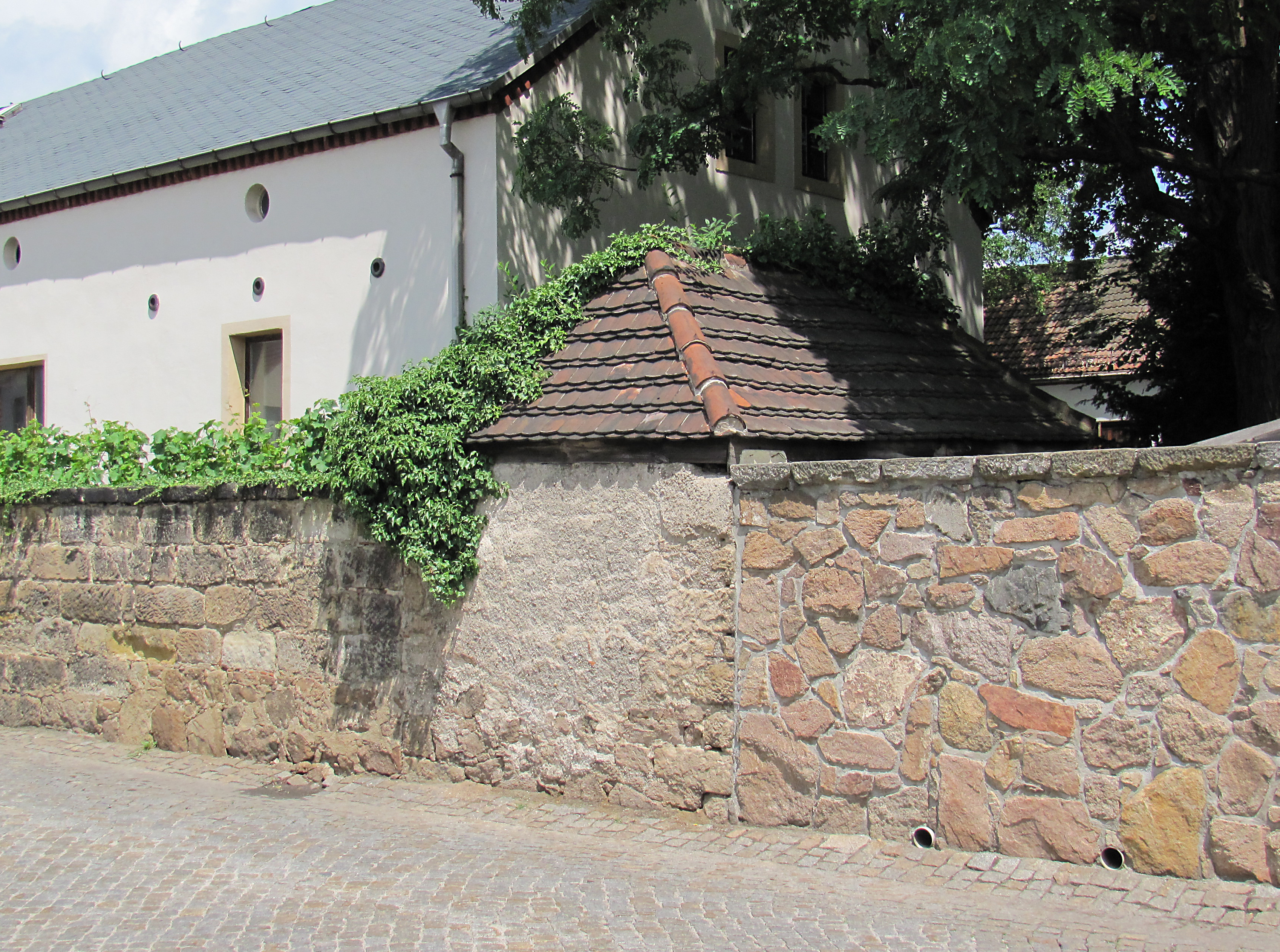 Radebeul, Krapenburg Backhaus